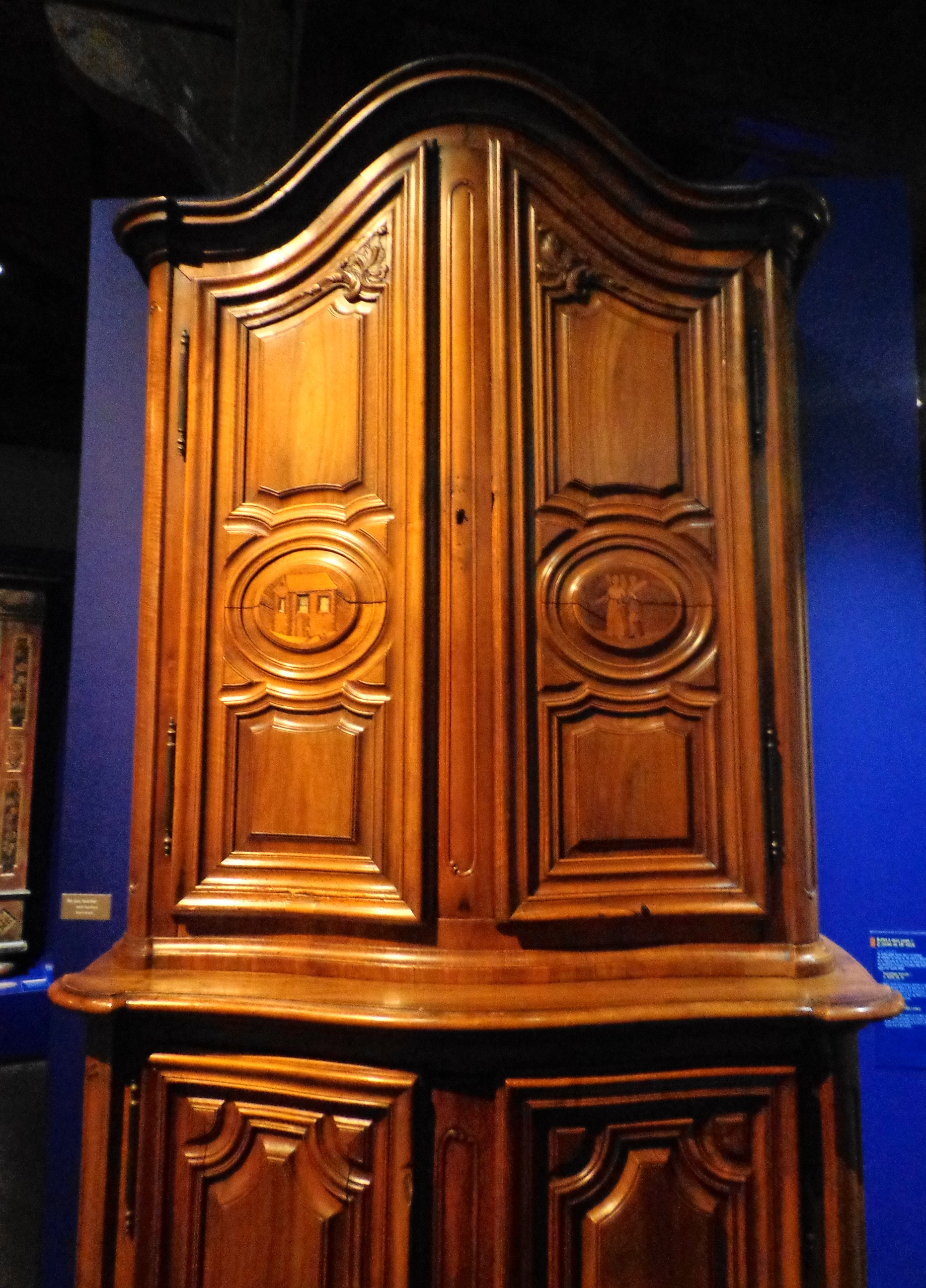 Œuvre strasbourgeoise datant de la seconde moitié du 18ème siècle